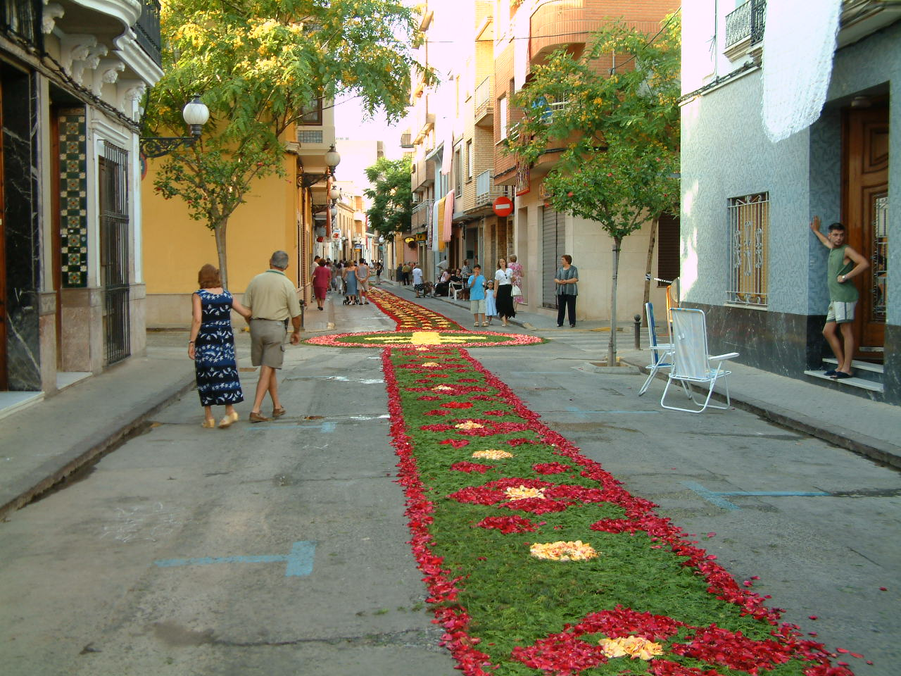 Tapís de flors del Corpus, Juny a Picanya